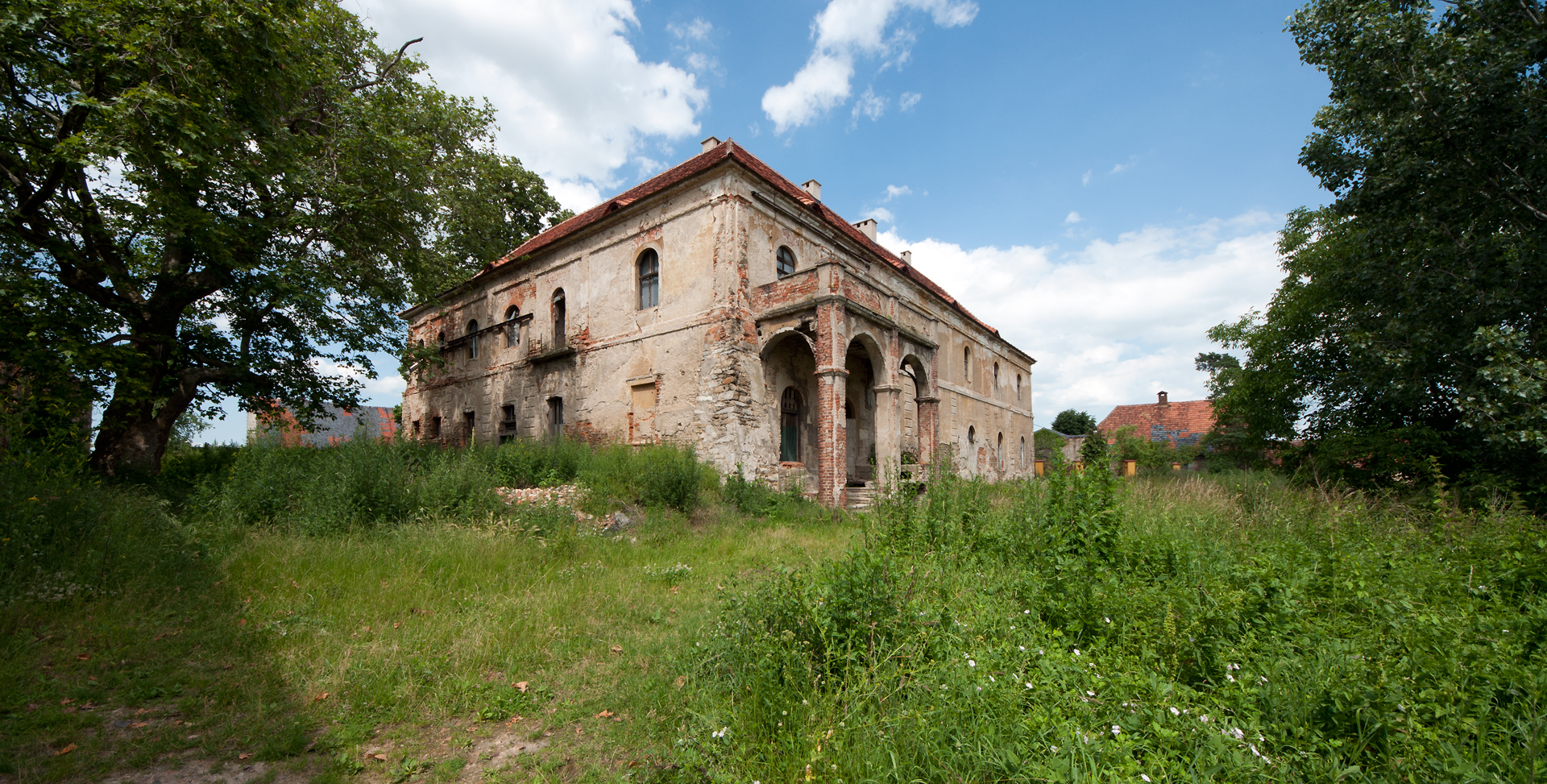 pałac opatów cysterskich Wierzbna, Żarów